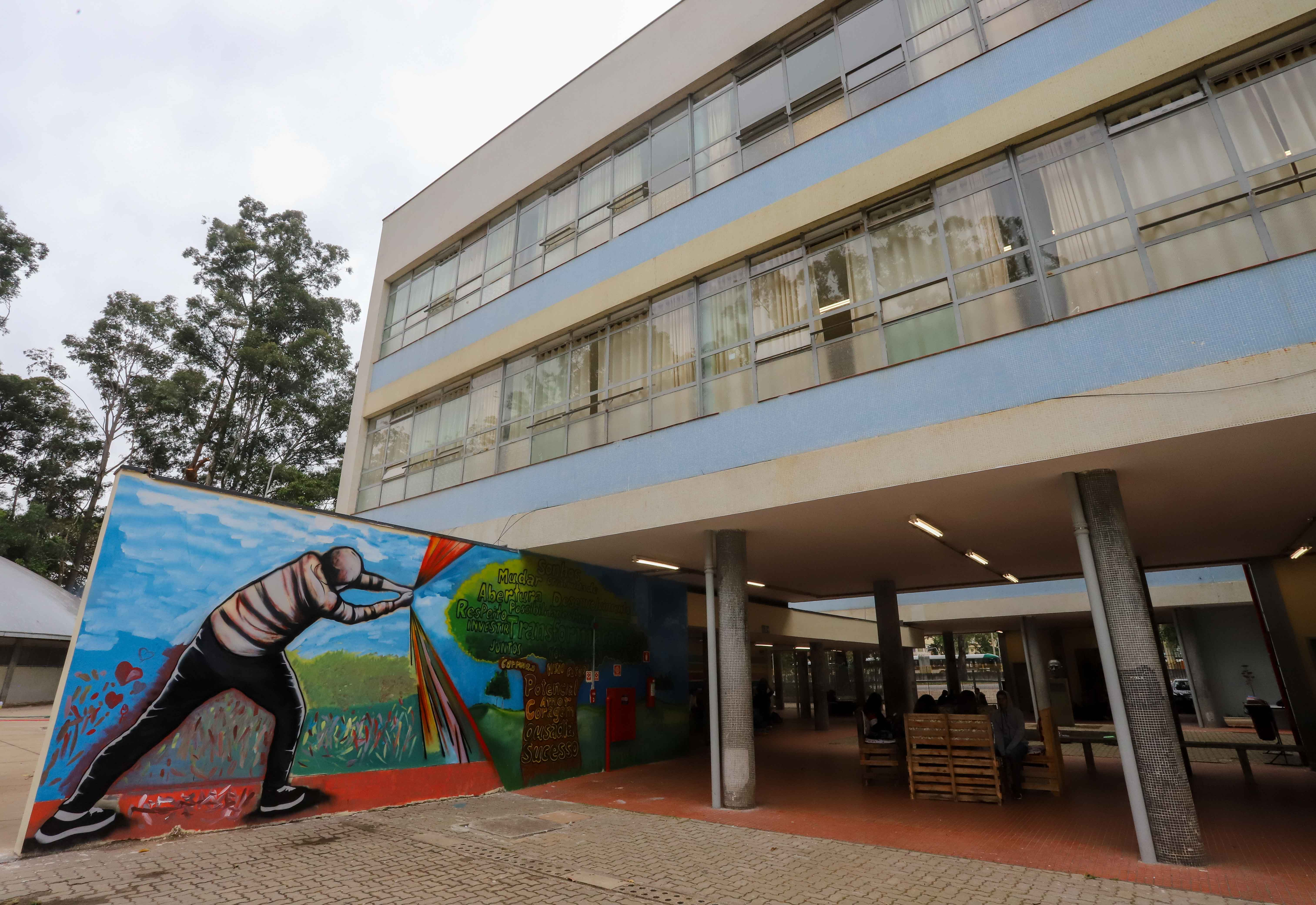 O governador do Estado de São Paulo, Márcio França, participa de visita técnica à Escola Estadual de São Paulo. Local: São Paulo/SP Data: 20/09/2018 Foto: Governo do Estado de São Paulo